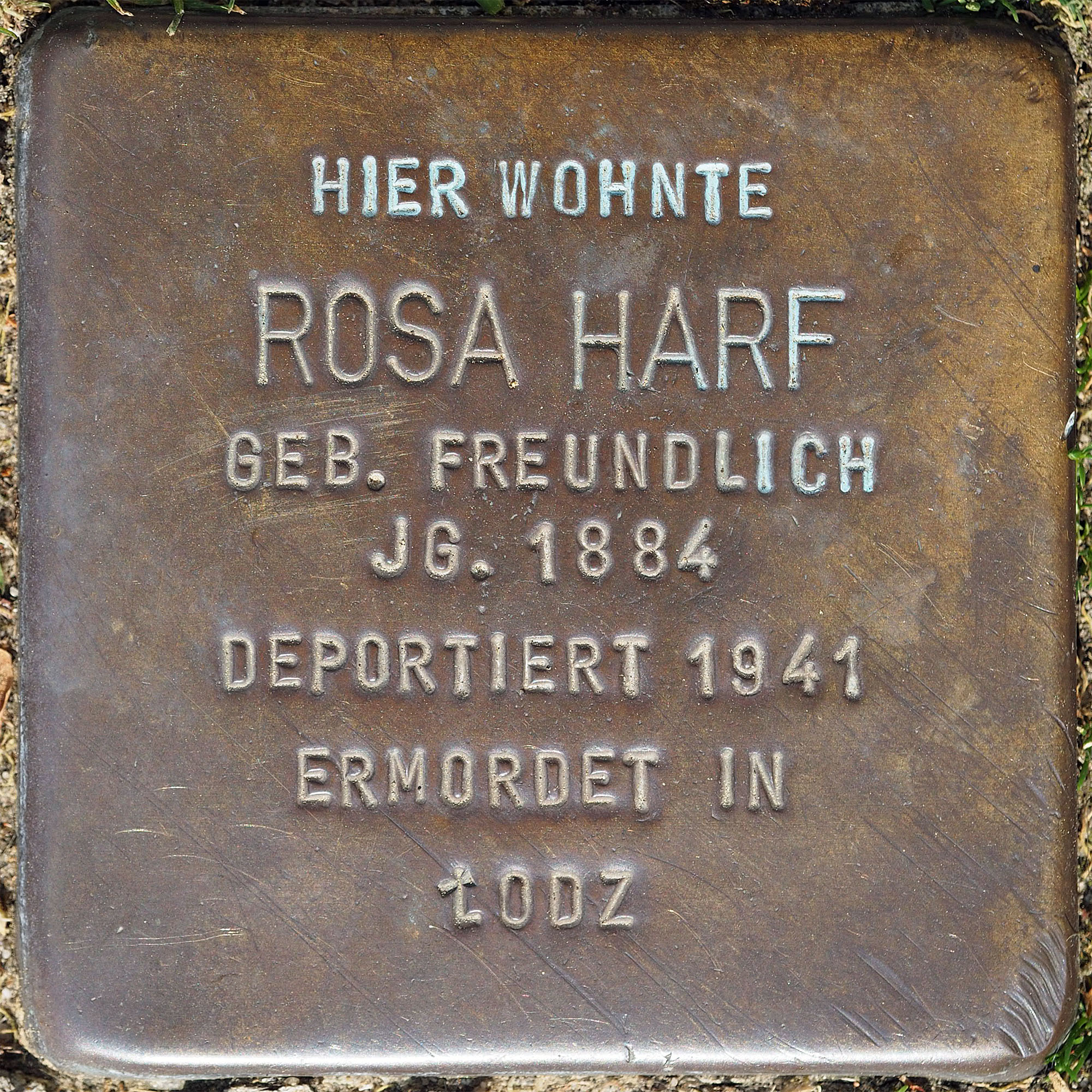 Stolpersteine MG: Harf, Rosa